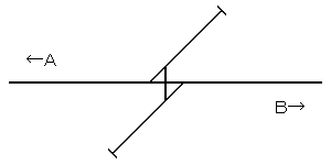 構内配線図 スイッチバック形